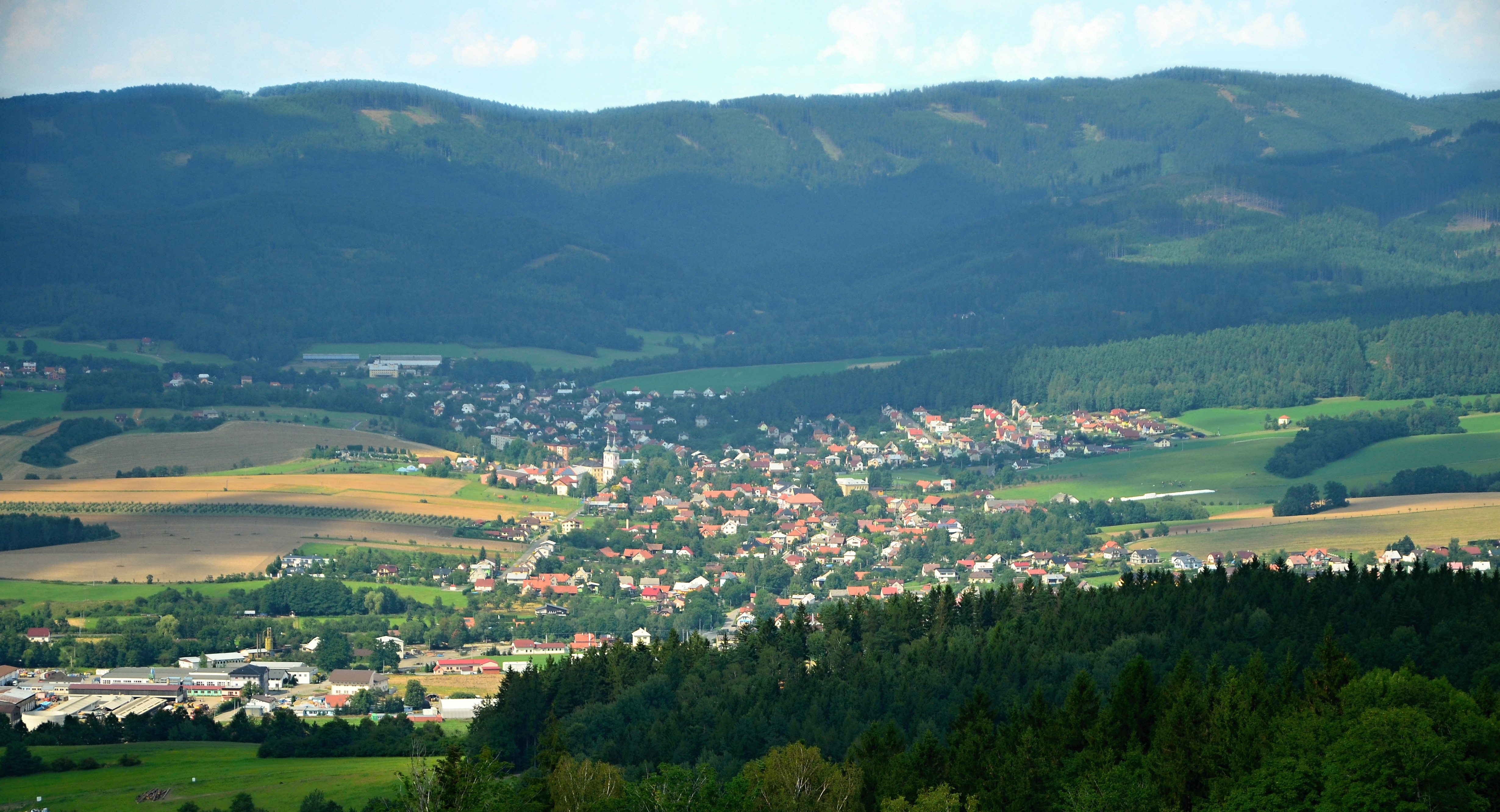 Zasova Pohled Z Male Lhoty